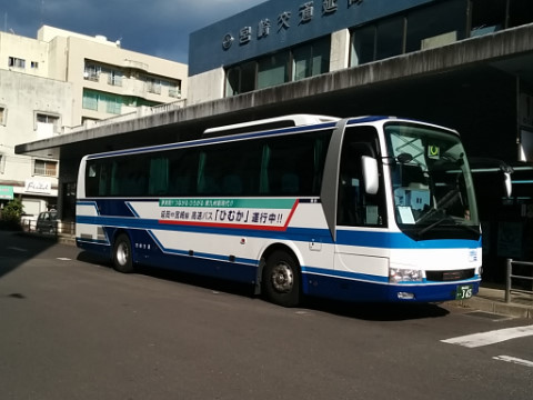 延岡駅前バスセンターに停車している『ひむか号』